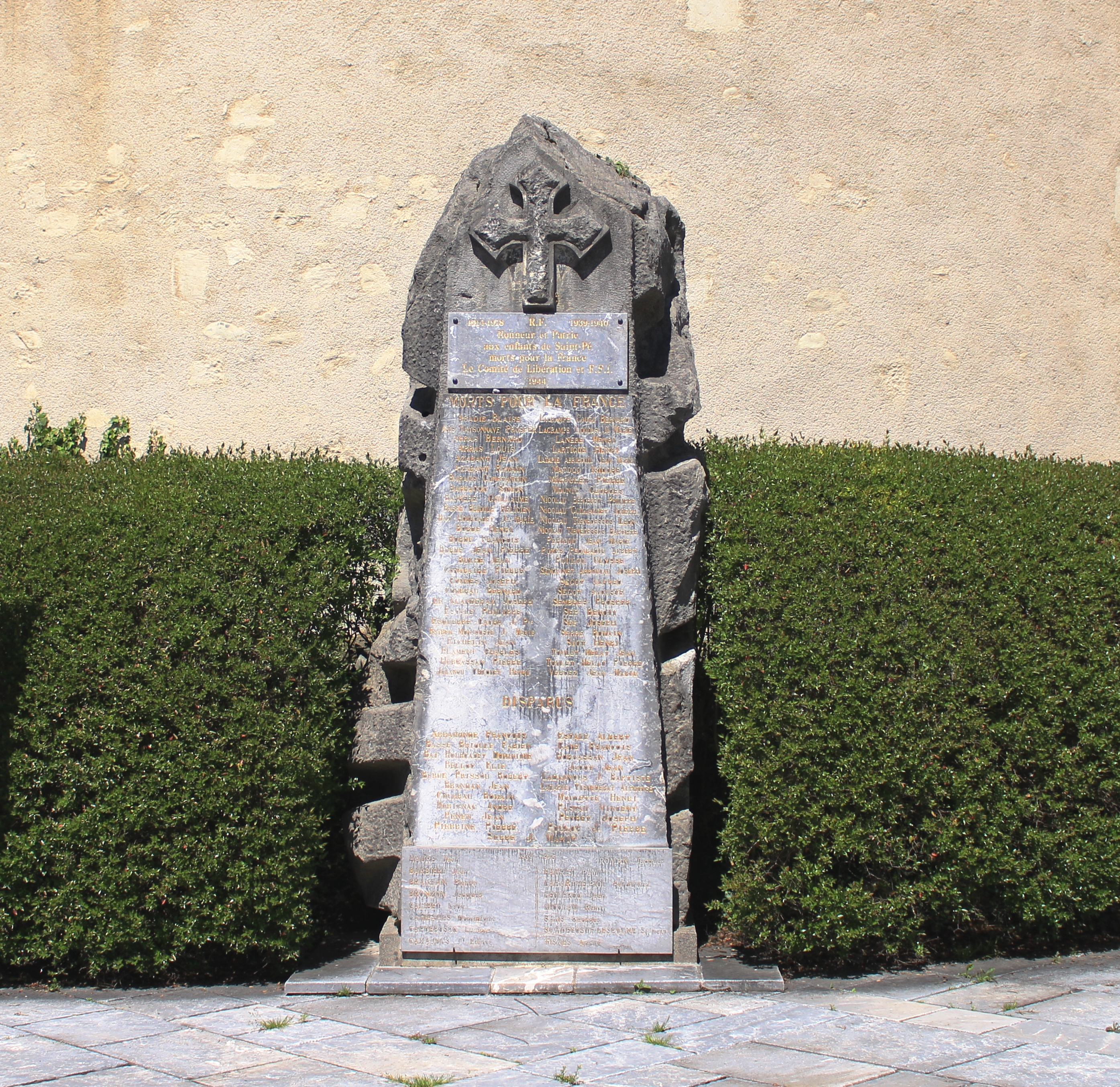 Monument aux morts de Saint-Pé-de-Bigorre (Hautes-Pyrénées)